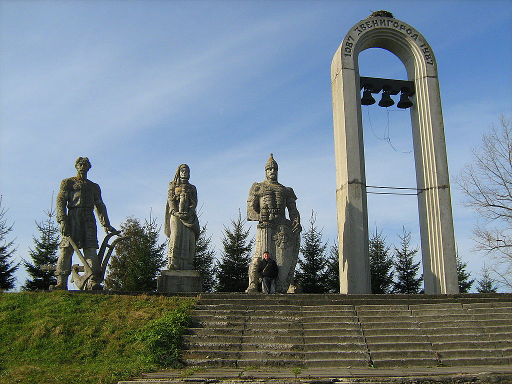 Памятник 1000-летию Звенигорода (Львовской обл.)